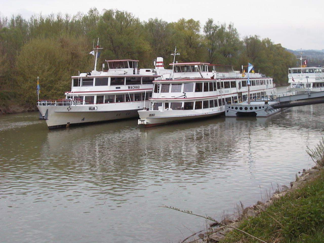 DDSG Blue Danube Ausflugsschiffe MS "Prinz Eugen" und MS "Wachau" im Melker Altarm